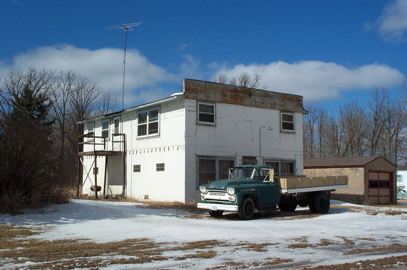 Erie, Minnesota